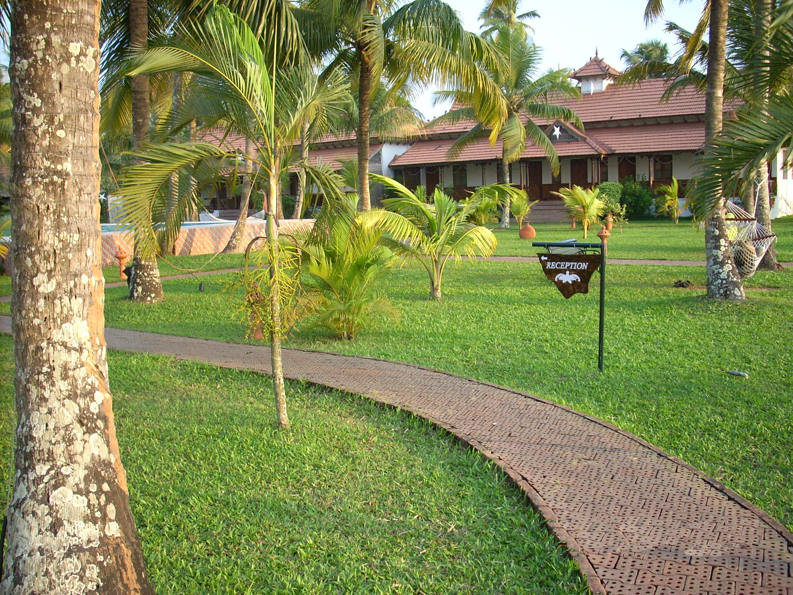 Cocobay Resort along Vembanad Lake in Kumarakom